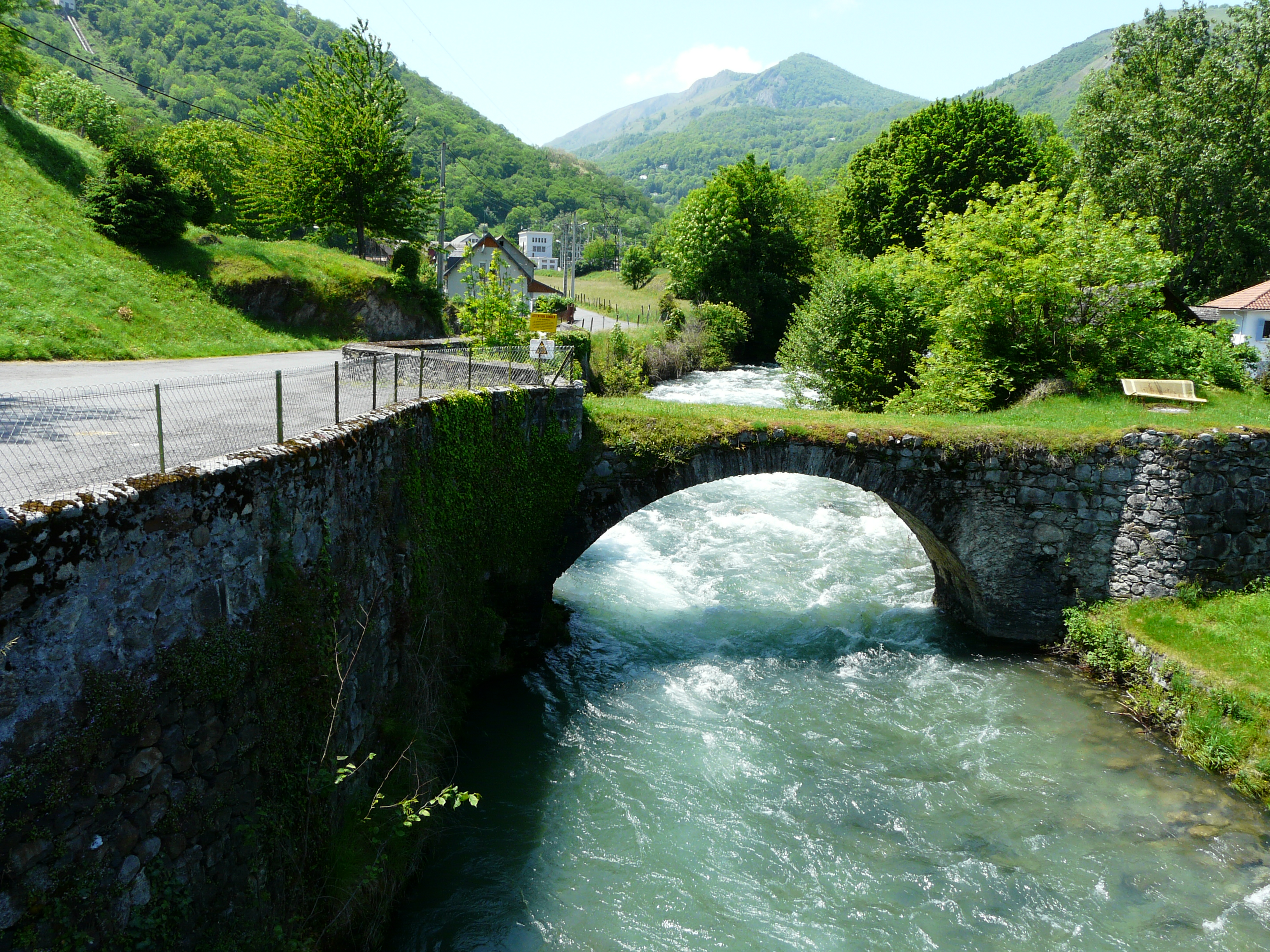 En amont du pont de la route départementale 921, le gave d'Azun marque la limite entre Lau-Balagnas (à gauche) et Argelès-Gazost (à droite), Hautes-Pyrénées, France.